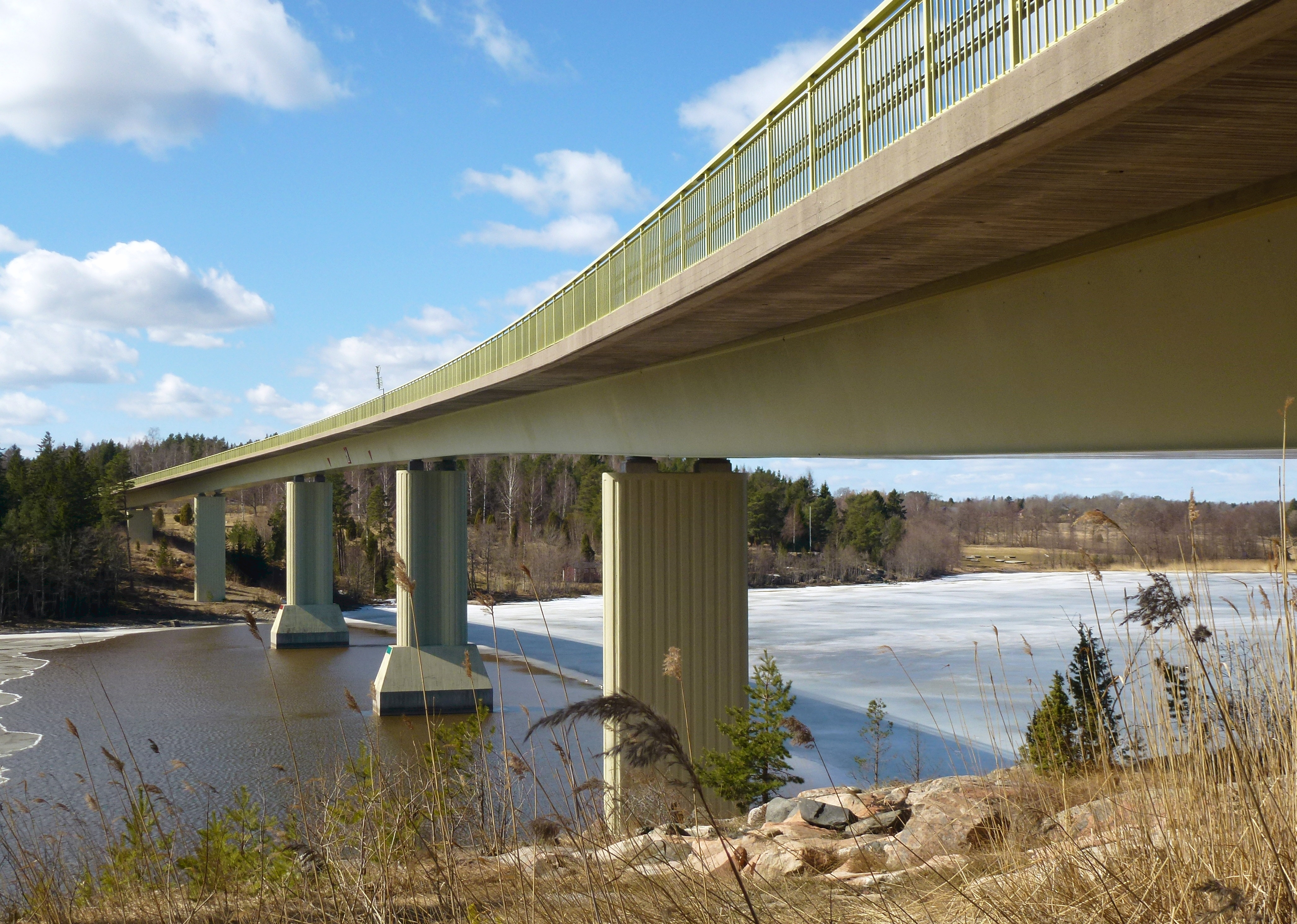 Trästabron